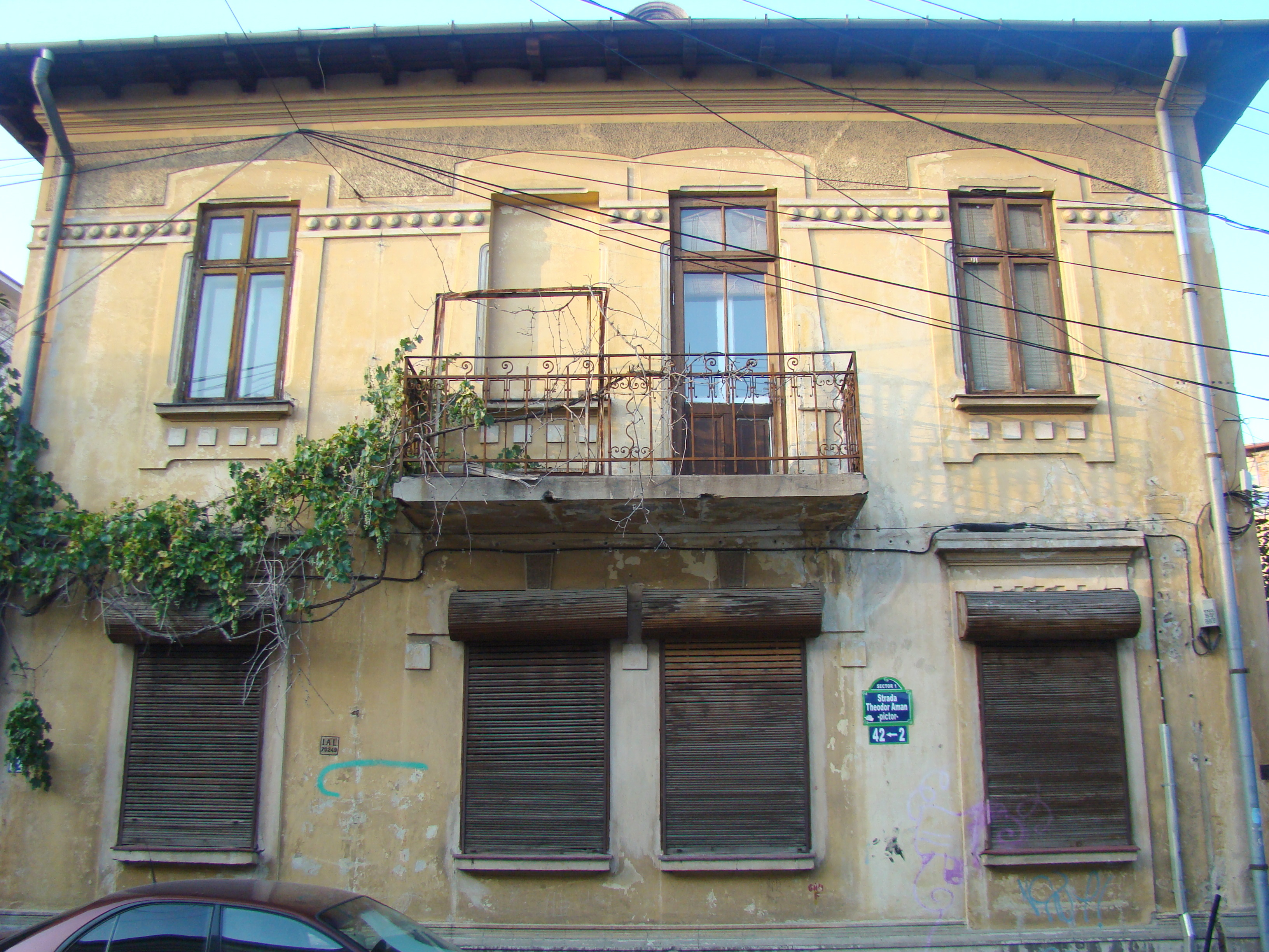 Casă monument istoric, str. Theodor Aman, nr.2